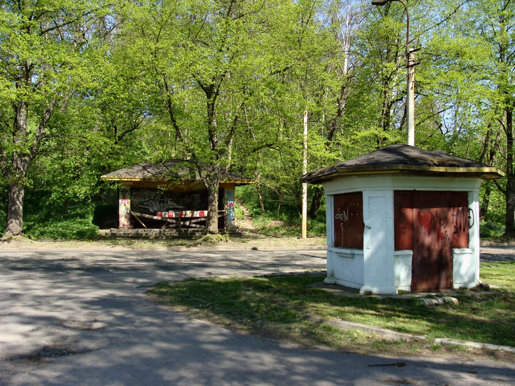 Wiata przystankowa i kiosk nastawniczego na pętli tramwajowej przy ul. Arkońskiej w Szczecinie